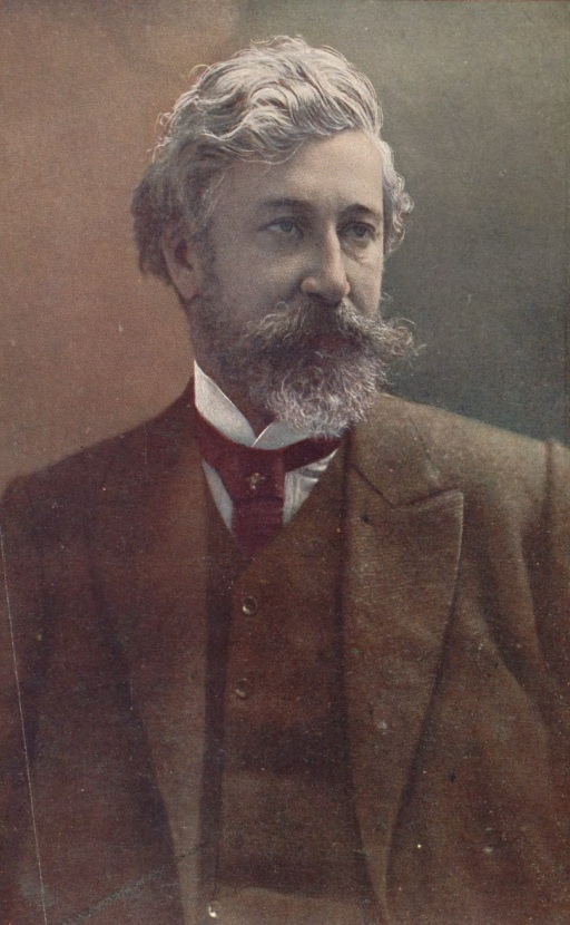 Santiago Rusiñol; fotografía de Kaulak